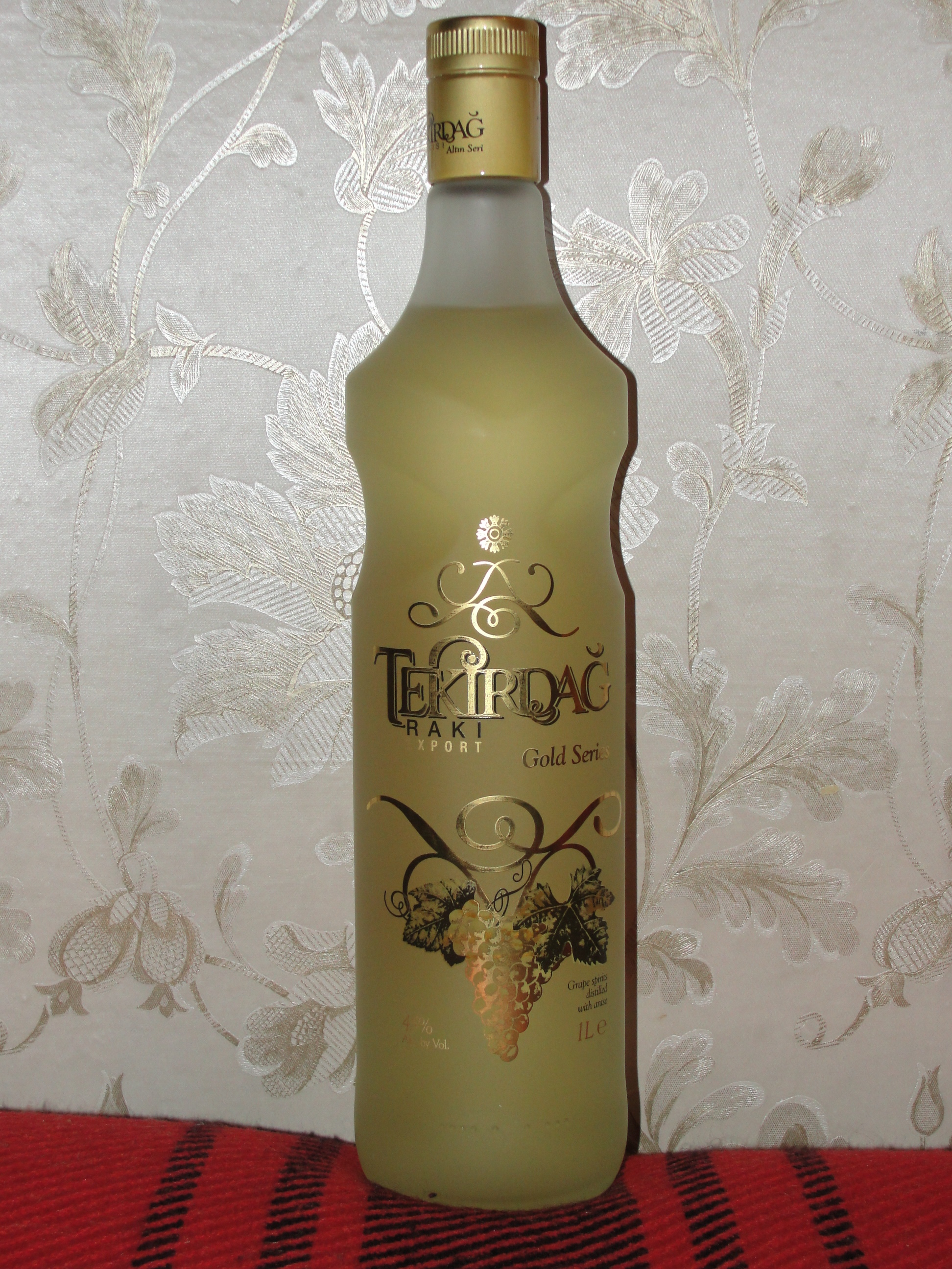 Bottle of Tekirdag Raki, 1 litre